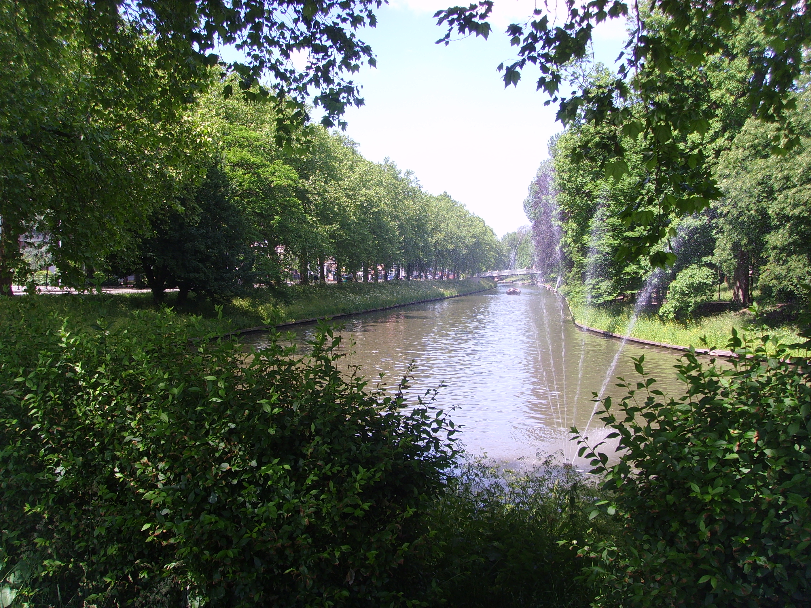 De Catharijnesingel, onderdeel van de Utrechtse Stadsbuitengracht, gezien vanuit het zuiden. - OpenStreetMap(Info)